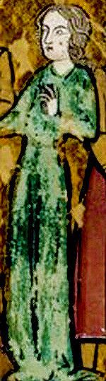 Sibylle de Jérusalem